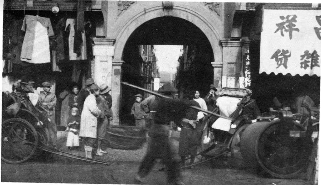 上海弄堂入口的老照片